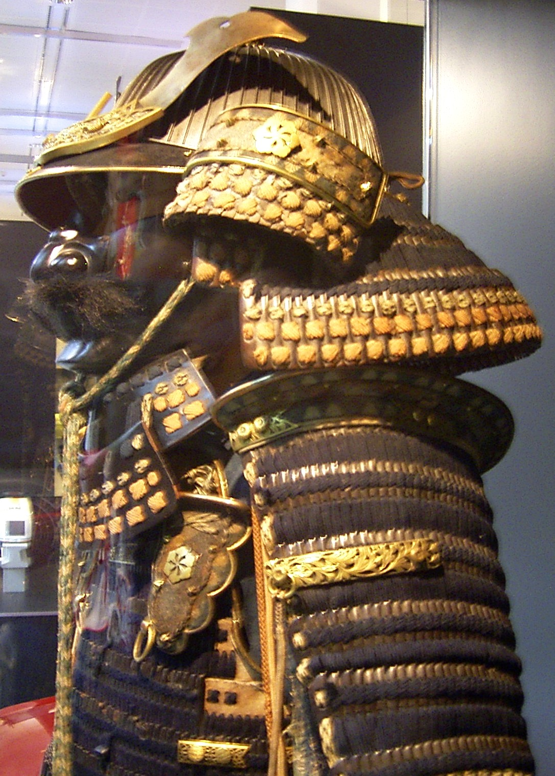 Leichte japanische Infanterierüstung aus dem Anfang des 19. Jahrhunderts. Aufgenommen in der Sonderausstellung Asien des Überseemuseums Bremen. Gesicht, Hals und Handrücken sind mit schwarz lackierten Blechen geschützt, Rumpf und Extremitäten sind mit emaillietren Metallstreifen bedeckt die mehrfach mit Textillitzen verflochten sind. Im Rumpfbereich ist dieses Geflecht auf einer Lederunterlage fixiert, an den Extremitäten auf Textil. An Armen und Beinen werden die Übergänge durch ein feines Kettengeflecht (ca. 0,5 mm Drahtstärke) geschützt.